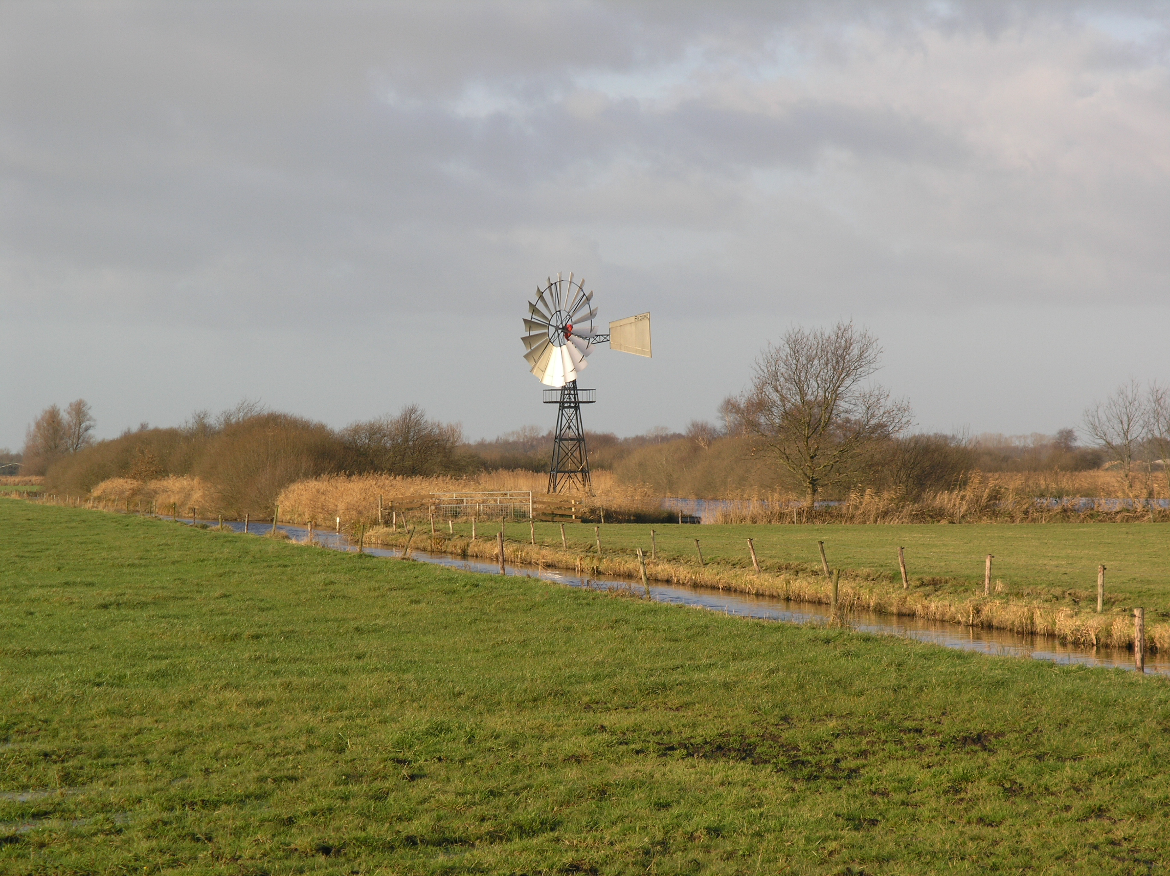 Blesdijke Windmotor